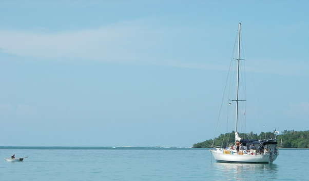 Mer des Caraïbes à Bocas del Toro (Panama)